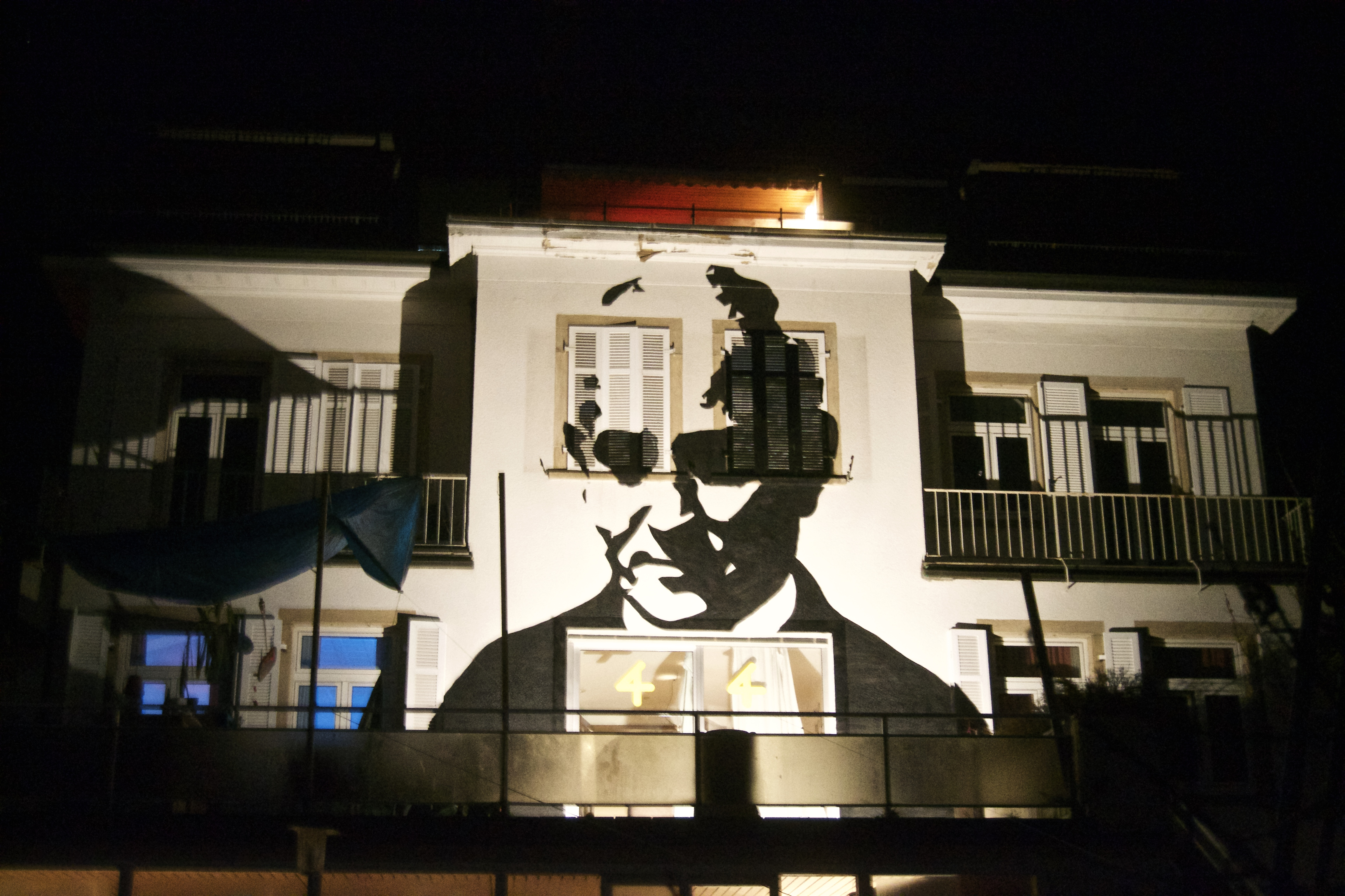 Das 6 Meter hohe Portrait entstand in der Nacht zu Allerheiligen an Gedenken an Eugen Bolz. Das Portrait ist von Hand gesprayt von Tom Stehr und dem Kollektiv 44.